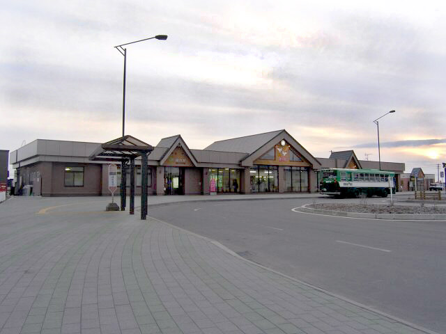 Shizunai Station in Hidaka Main Line, Japan